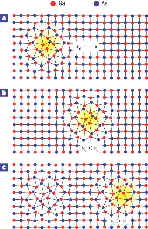 Polyaron.